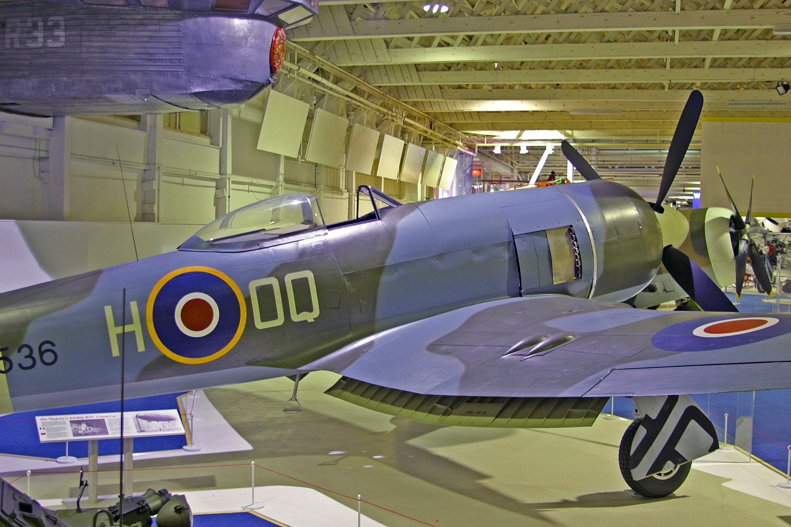 Hawker Tempest II at RAF Hendon Museum,2004